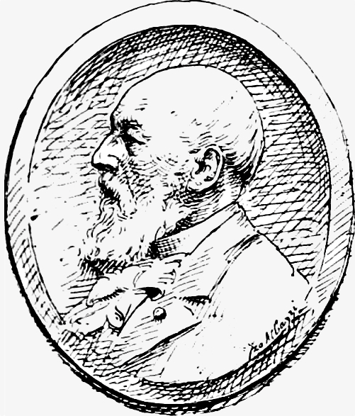 "Alfred Darcel, ancien adm[inistrateur] de la manufacture des Gobelins."